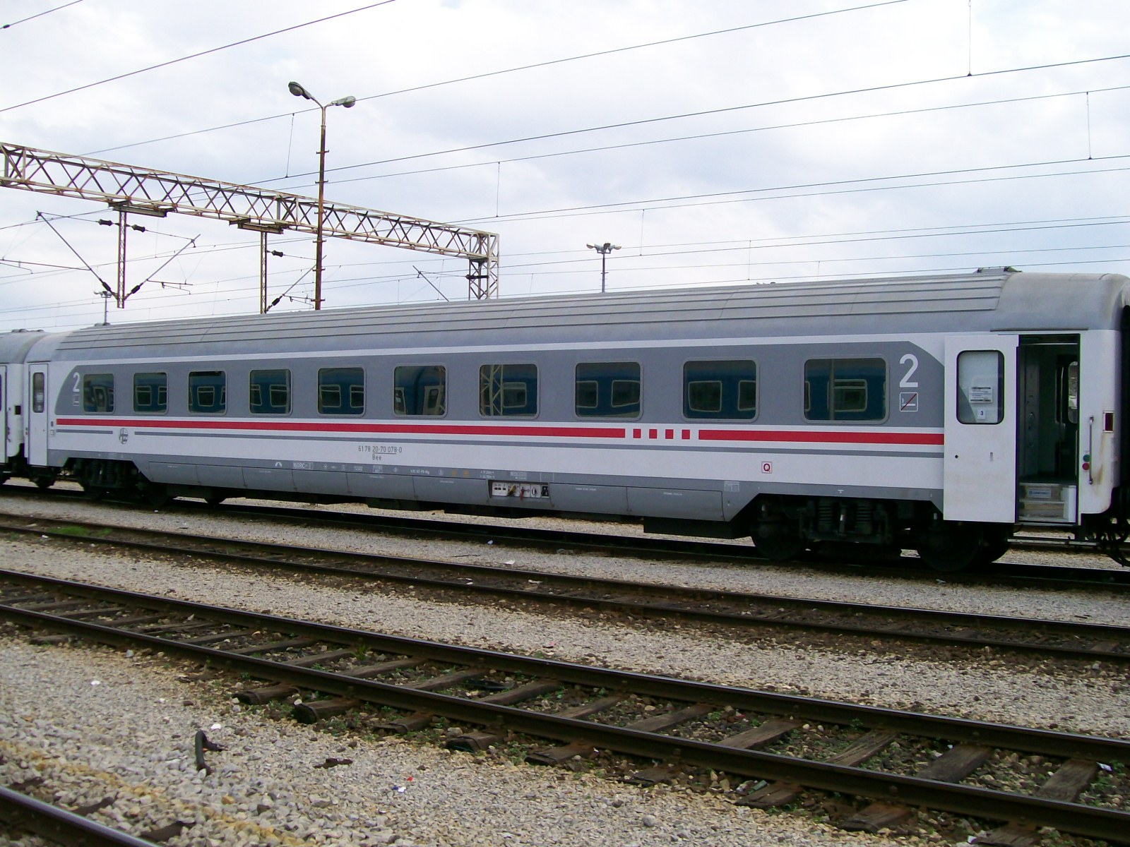 Vagon sa sjedalima 2. razreda Hrvatskih željeznica (Slovna serija Bee, brojčana 20-70)